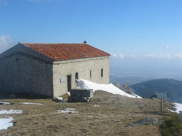 La Chapelle de Saint-Sabin qui domine le village de Véranne.